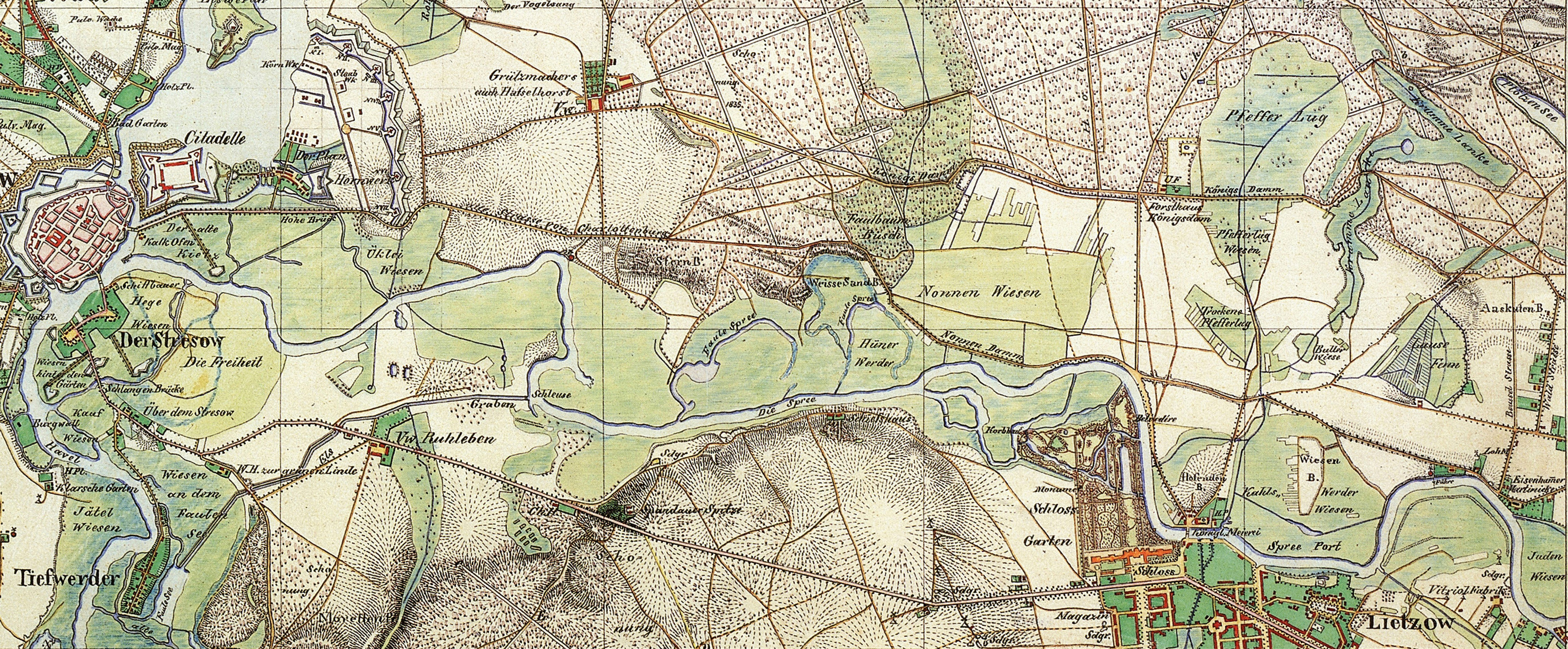 Der Nonnendamm ist Teil der Straße zwischen Spandau und Berlin. Die Straße ist auf der Karte des Urmesstischblattes um 1835 im Verlauf dargestellt. Dies ist ein Kartenausschnitt von Urmesstischblatt "Spandau" um 1835 (Messtischblatt-Nr. 3445) Format: 44,9 x 45,2 cm (nur der Plan) Maßstab: 1:25.000 Unter dem Plan steht: "Aufgenommen von den Ingenieur-Geographen Emphinger, Glaeser und Wolff; gezeichnet von Glaeser; revidiert durch Maull Inge:Geogr:1885."